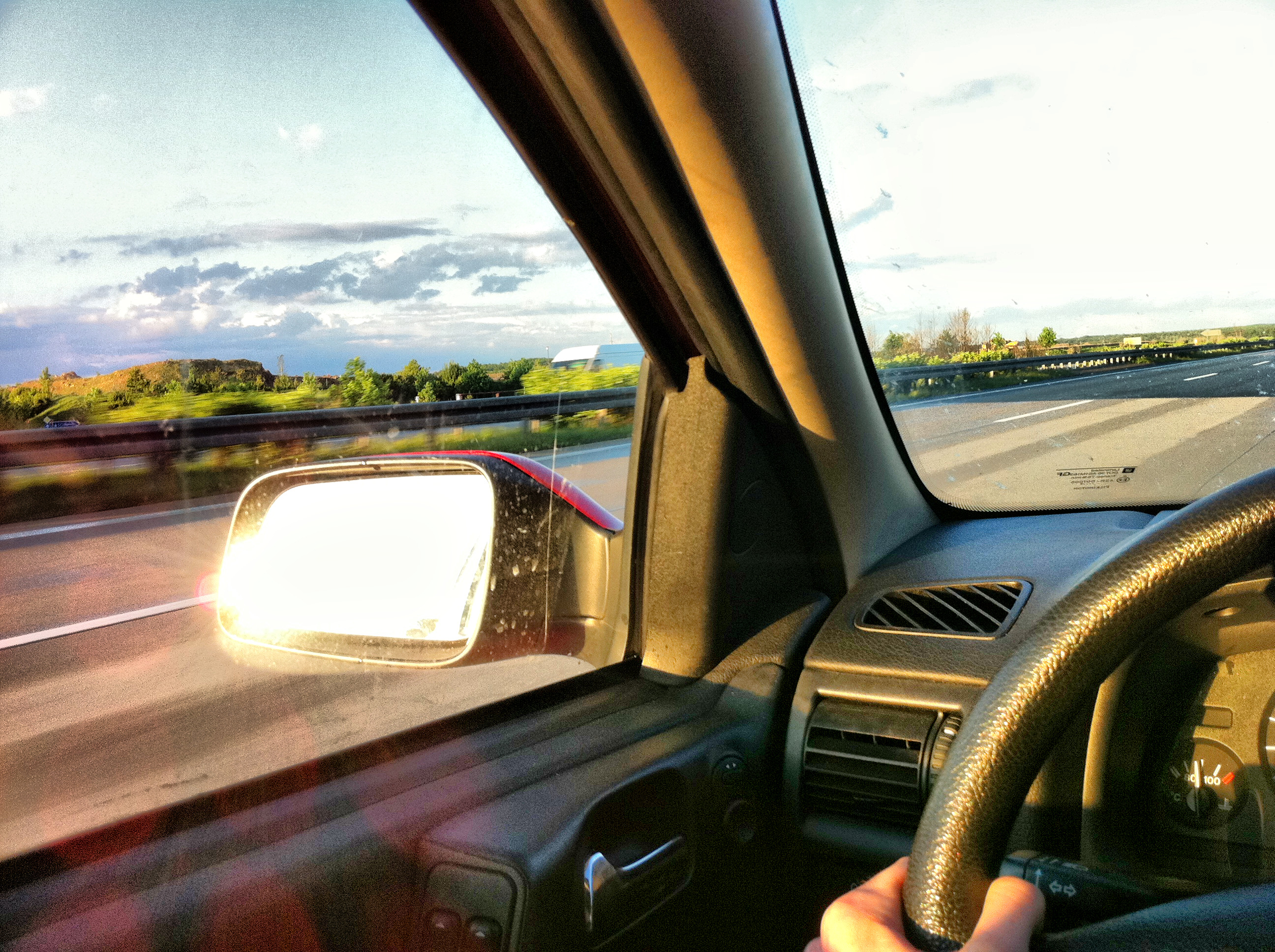 Autobahn